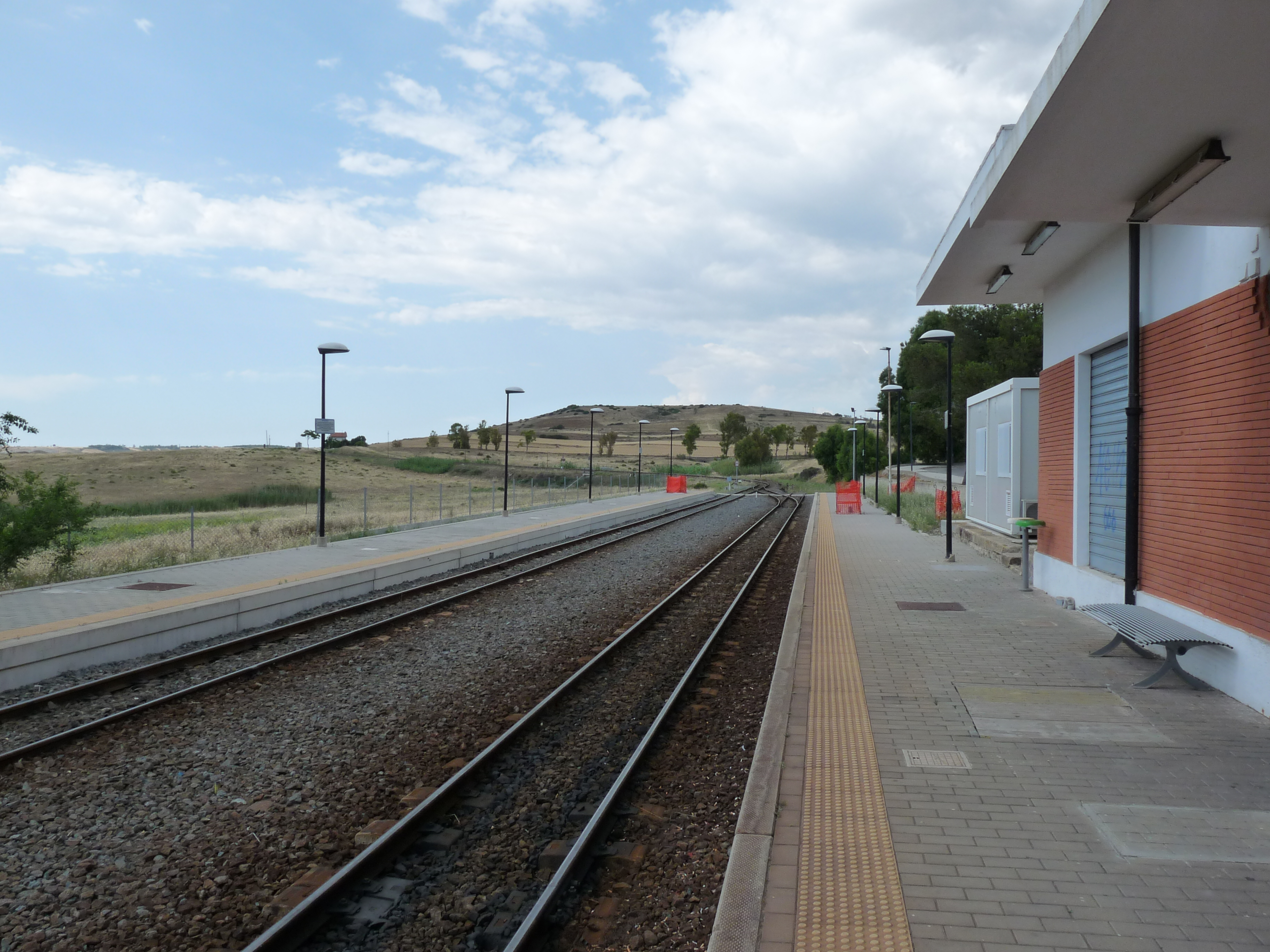 Het Settimo San Pietro station van de FdS